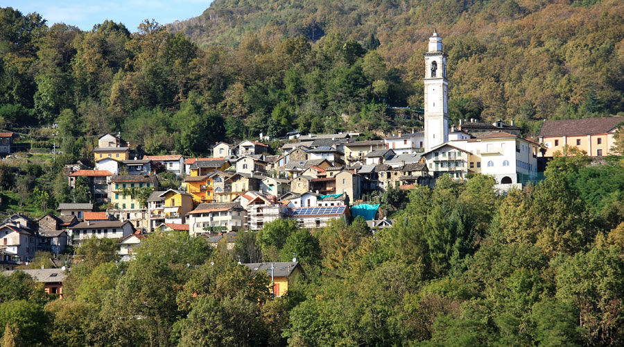 Panorama di Cossogno (VB)